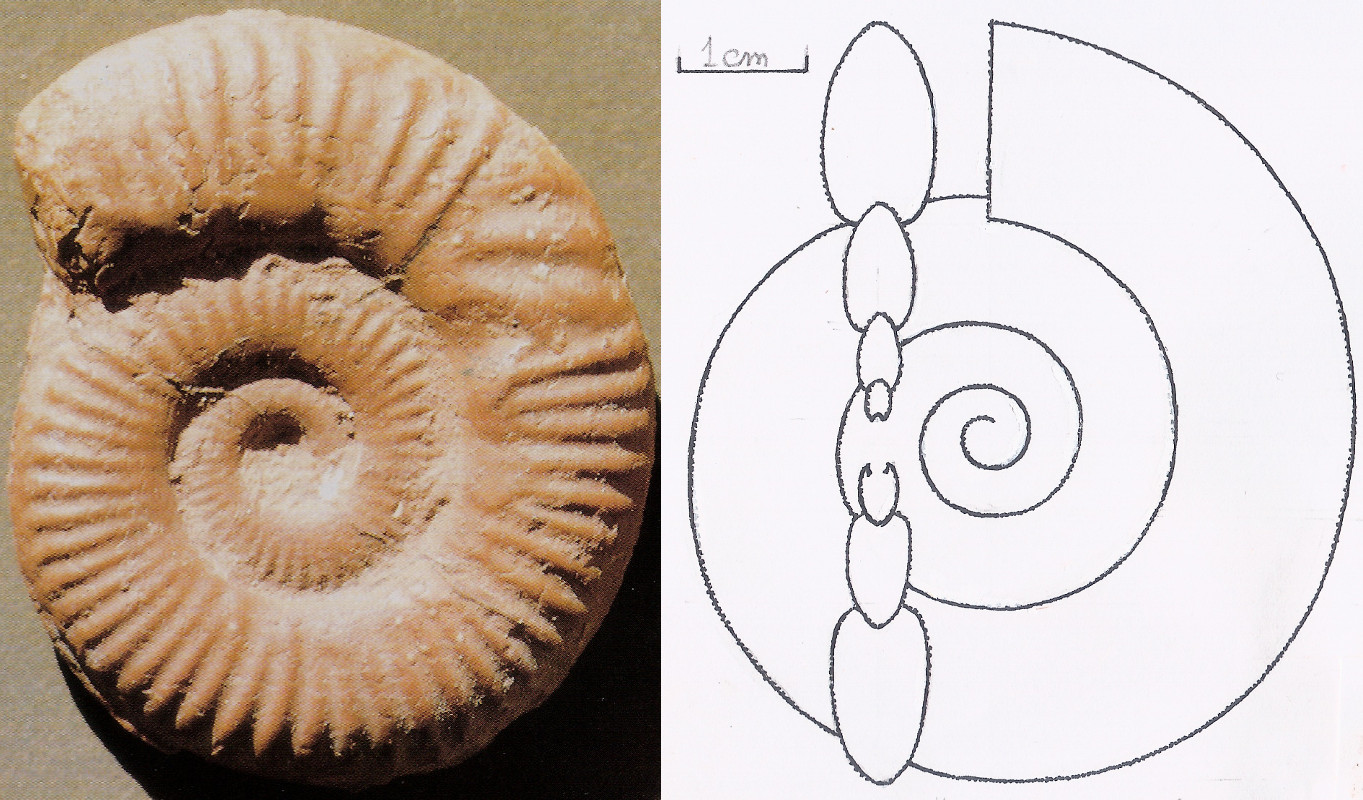 A sinistra foto dell'esemplare del M. dell'Eremita; a destra avvolgimento spirale e sezione dei giri di un altro esemplare